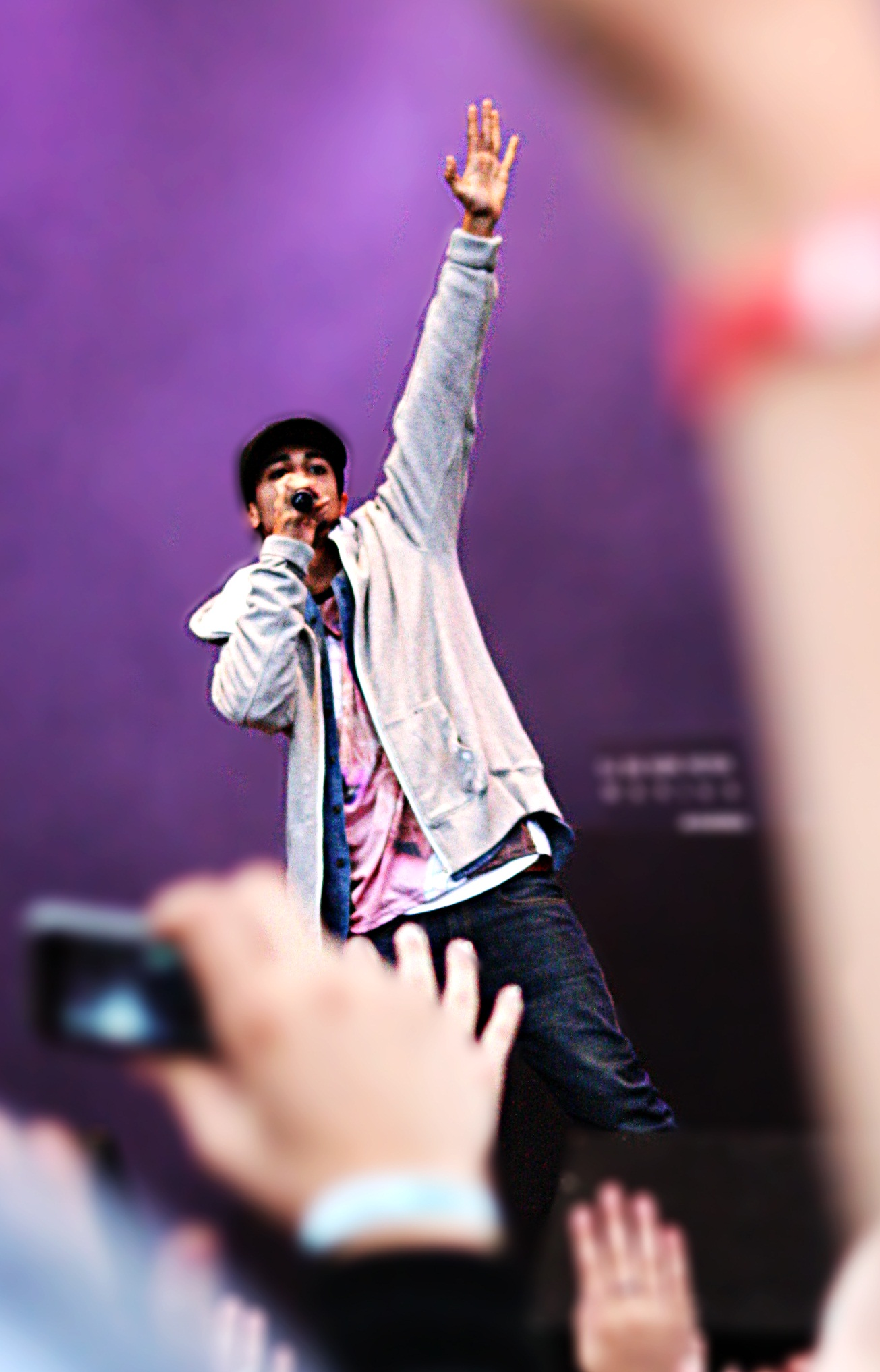 Karpe Diem at Døgnvill 2009